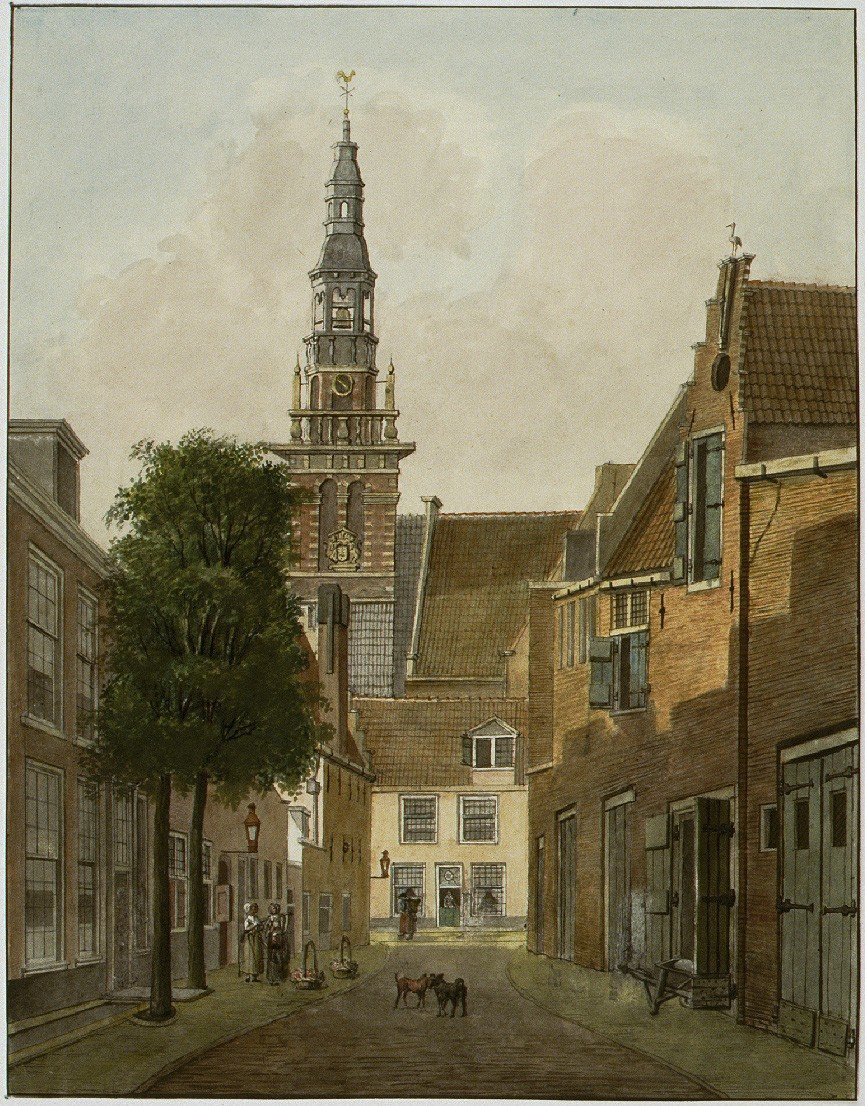 t Zeylklooster tegenwoordig afgebrooken : [het Zijlklooster te Haarlem vanuit de Witte Herenstraat] [afbeelding] / [door] J.Pannebakker. - [ca.1820]. - 1 tekening : pen in zwart en penseel in kleuren ; 34,9 x 26,7 cm. Titel op de versozijde linksonder. - Niet gedateerd, gesigneerd eveneens op de versozijde linksonder: 'door J:Pannebakker'. - Zonder watermerk. Afgebeeld is de Witte Herenstraat bij de Zijlstraat, met gezicht op de toren van het in 1818 afgebroken Zijlklooster. Gestoffeerd met een aantal figuurtjes, waaronder twee vrouwen, van wie één twee bloemenmanden bij zich lijkt te hebben, alsmede twee honden en een ooievaar op de geveltop rechts. - Oriëntatie: ziende naar het zuidwesten. - De inhoudsdatering is ultimo 1818, omdat in dat jaar het klooster werd afgebroken. - Literatuur: Een topografisch-historische verkenning rond het voormalige Zijlklooster te Haarlem / door A.M.van den Broek. - in: Haerlem Jaarboek 1987. - pag.83-93. Herkomst: onbekend. - Dia aanwezig. - Negatiefnummer Index Bouwkunst Zeist (KHIU): 8177 Identificatienummer: 53-000306 M